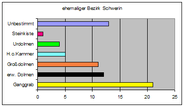 Schwerin